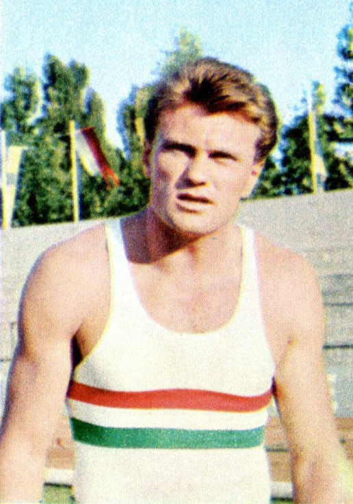 CAMPIONI DELLO SPORT 1967/68-n. 54 -ZSIVOTZKY - ATLETICA